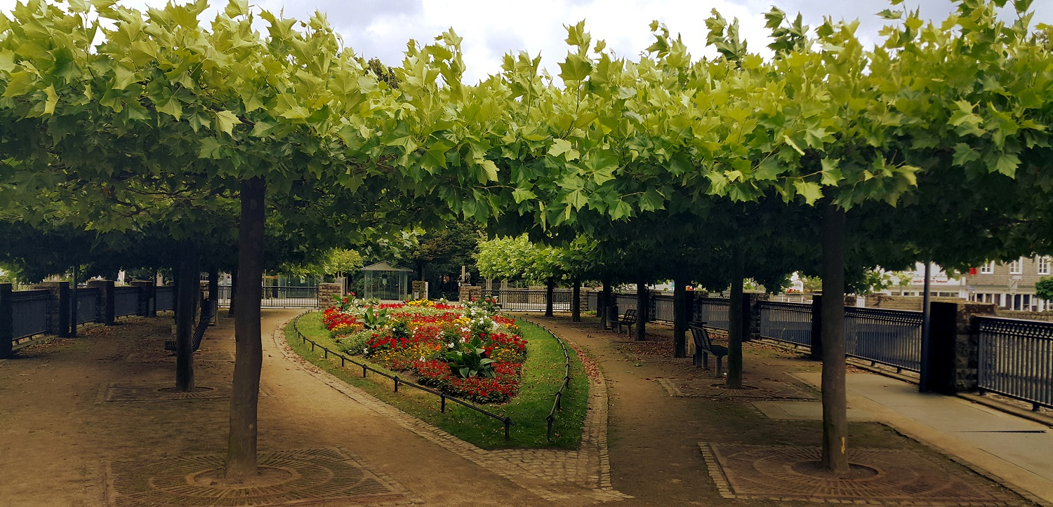 Skvera Lipštate